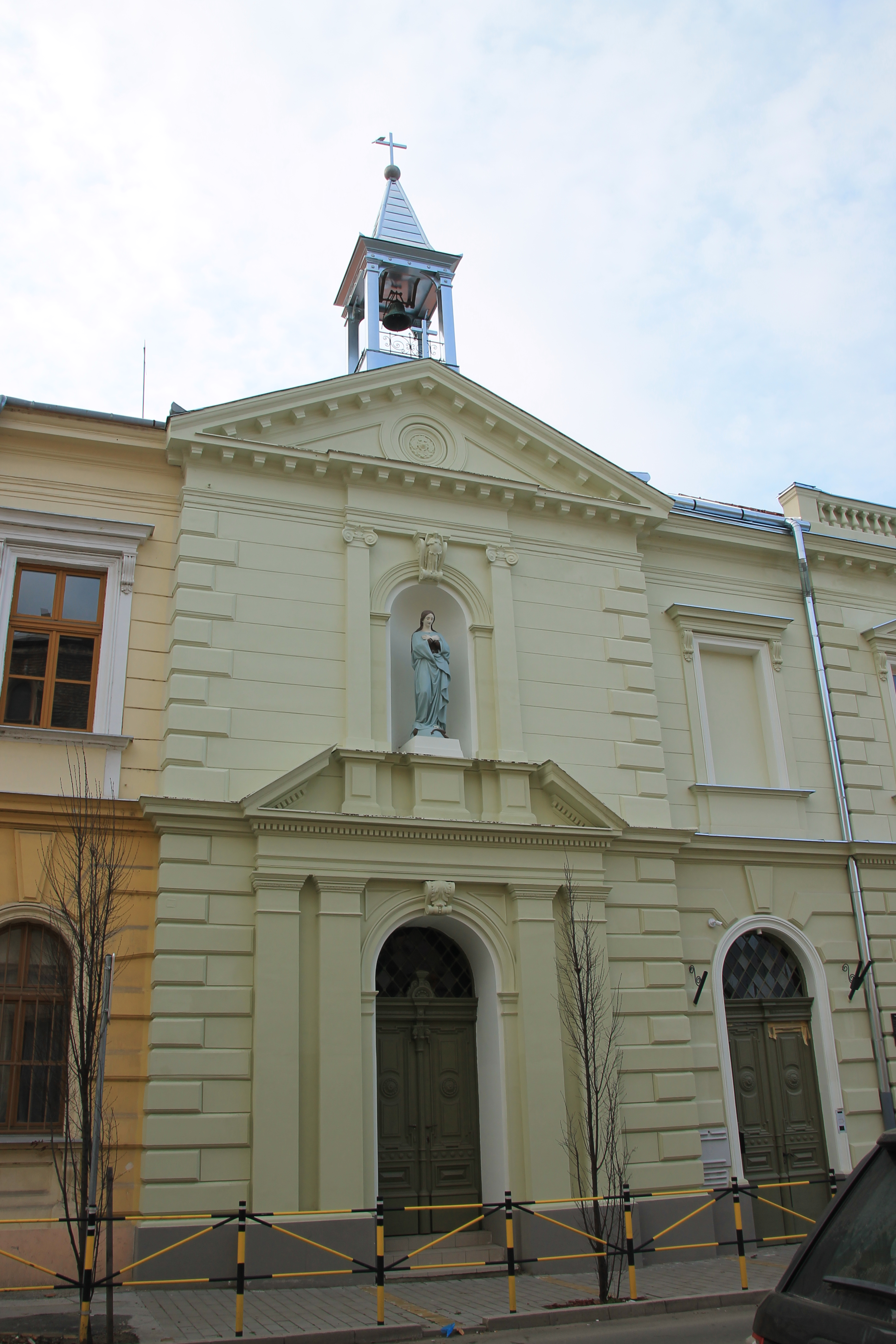 Staro jezgro Zrenjanina